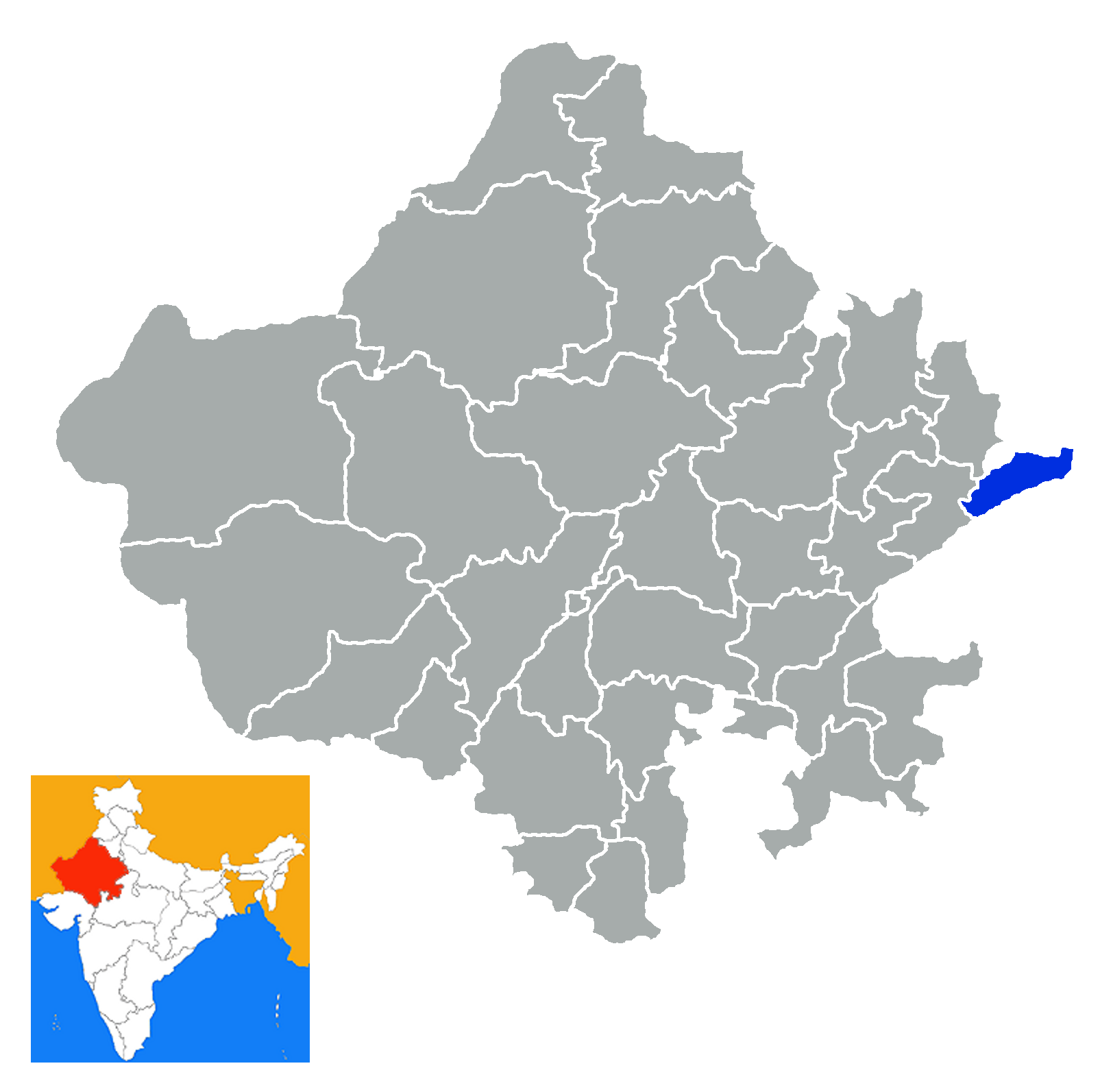 Distrito de Dholpur Rajastan India